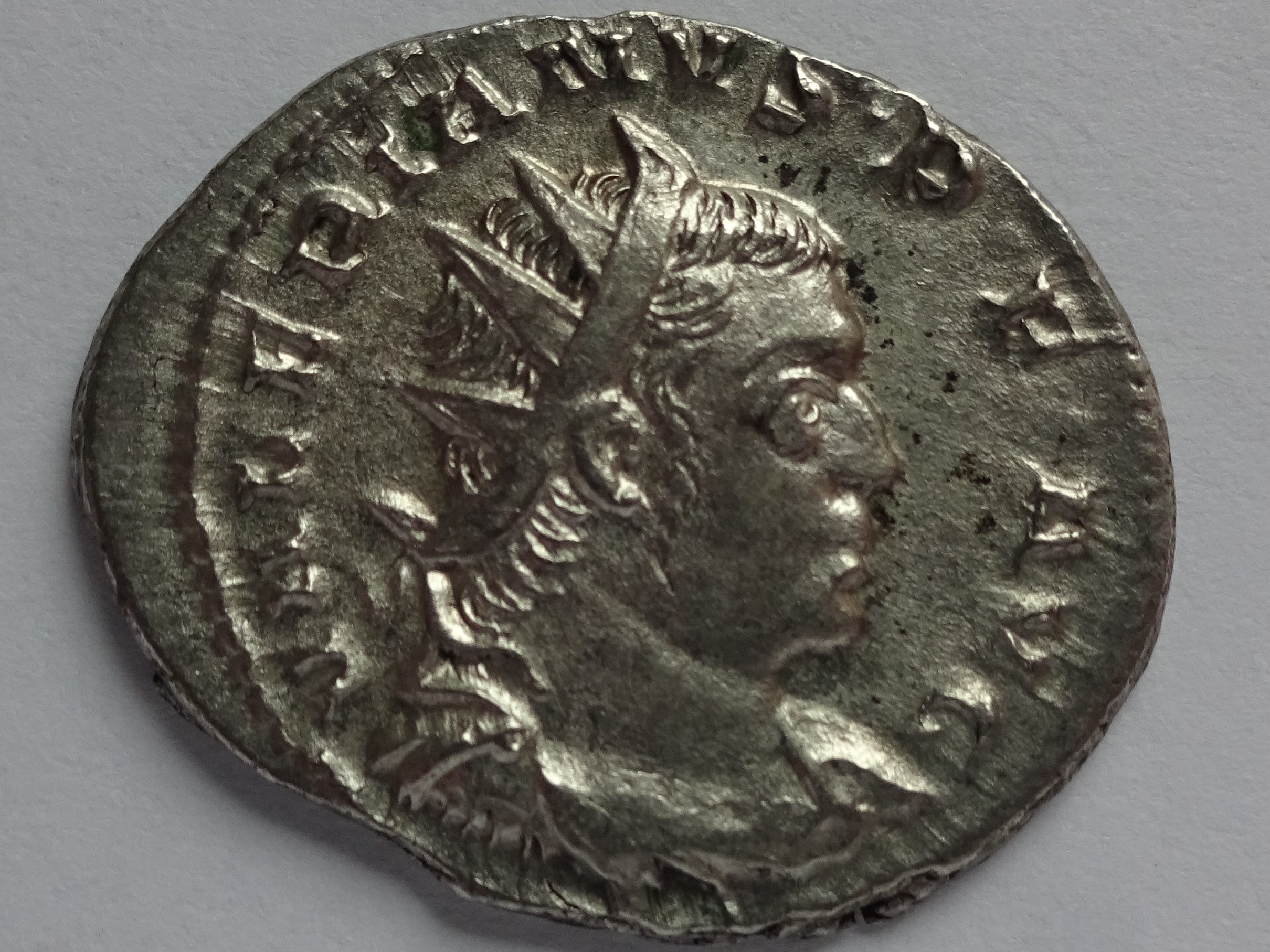 sog. Antoninian des Valerian I., Kampmann 88.41